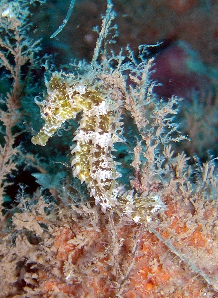 אם את/ה מעוניין לעשות שימוש בתמונה, אזי את הקרדיט העניקו לאסף זבולוני, אוניברסיטת תל אביב. תמונה זו הועלתה לוויקיפדיה ברשות על ידי משתמש:צ'כלברה.